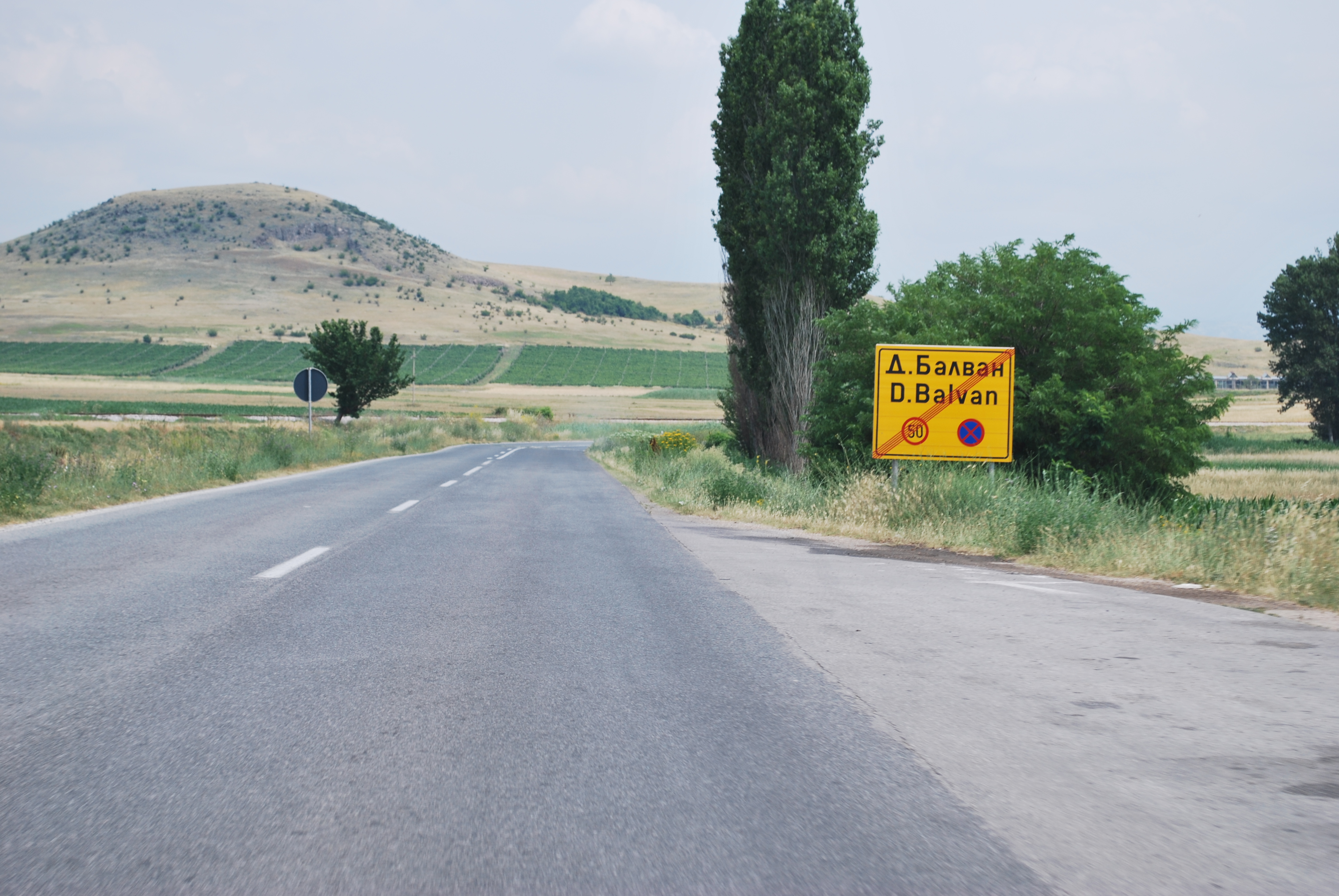 Dolni Balvan, Macedonia